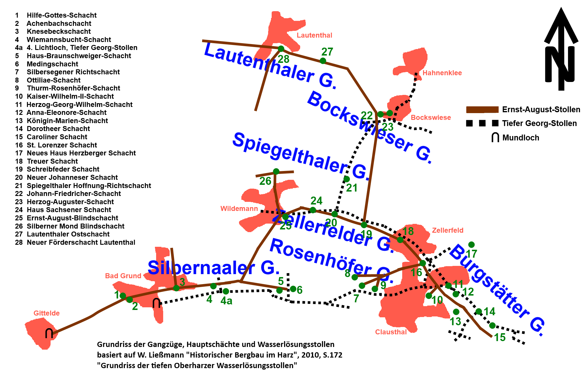 Grundriss der Harzer Gangzüge, Hauptschächte und Wasserlösungsstollen.